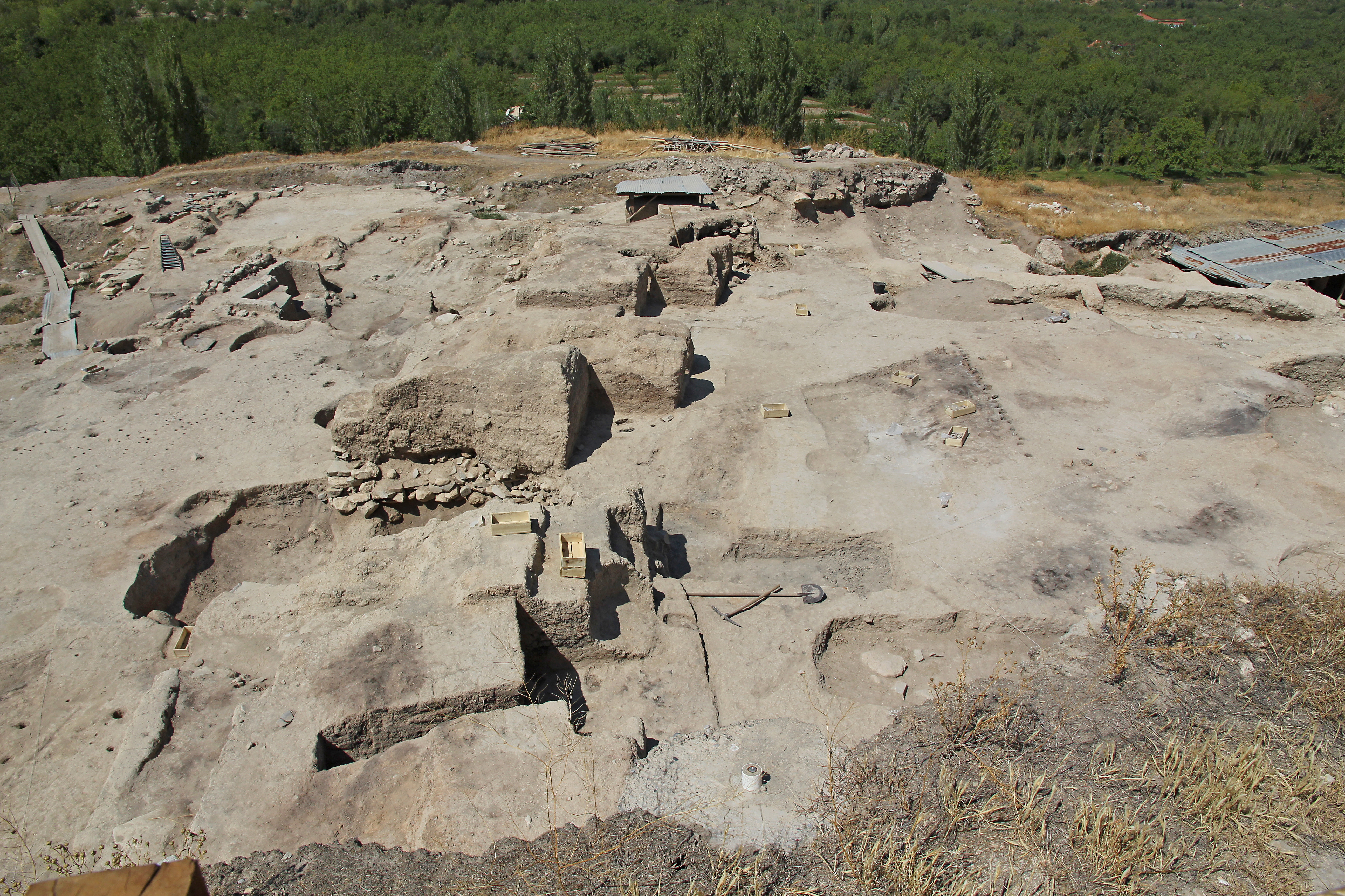 Arslantepe, prähistorischer Siedlungshügel bei Malatya, Türkei